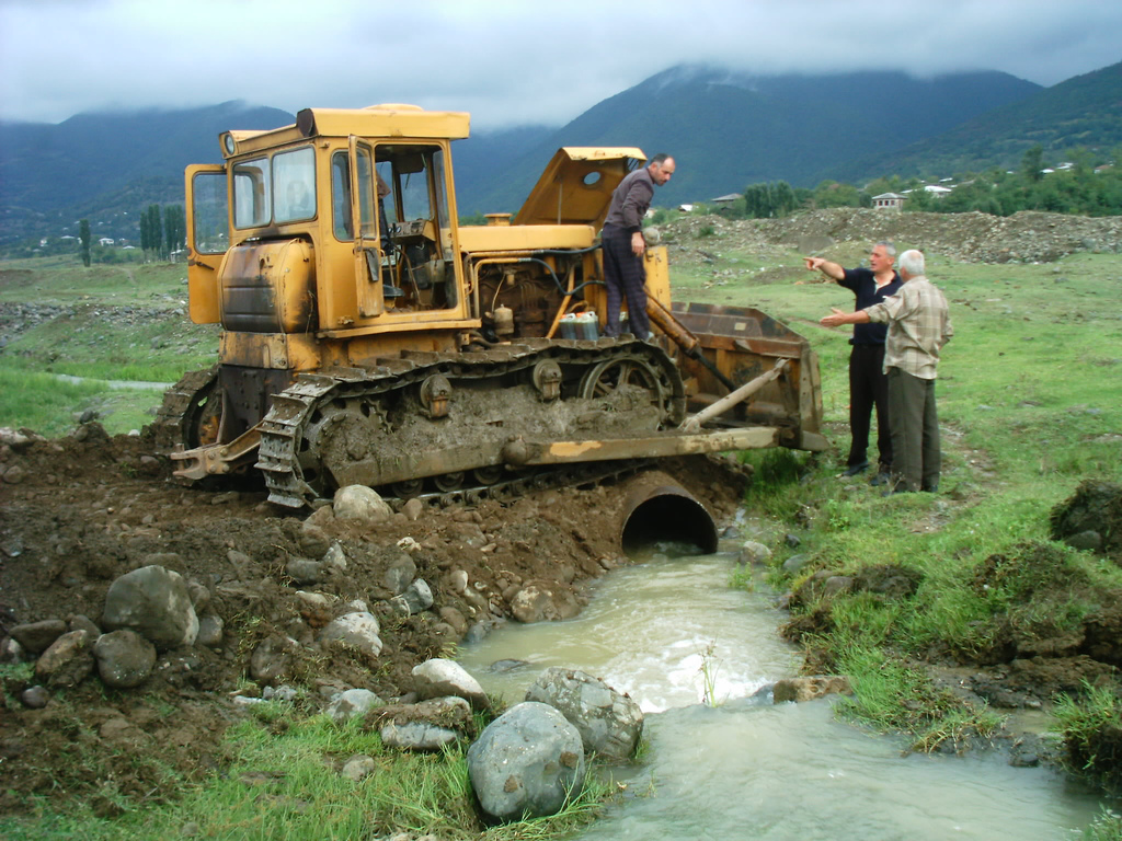 Fotos aus Sachkhere (Georgien). Näheres siehe en español Arroyo near Sachkhere.